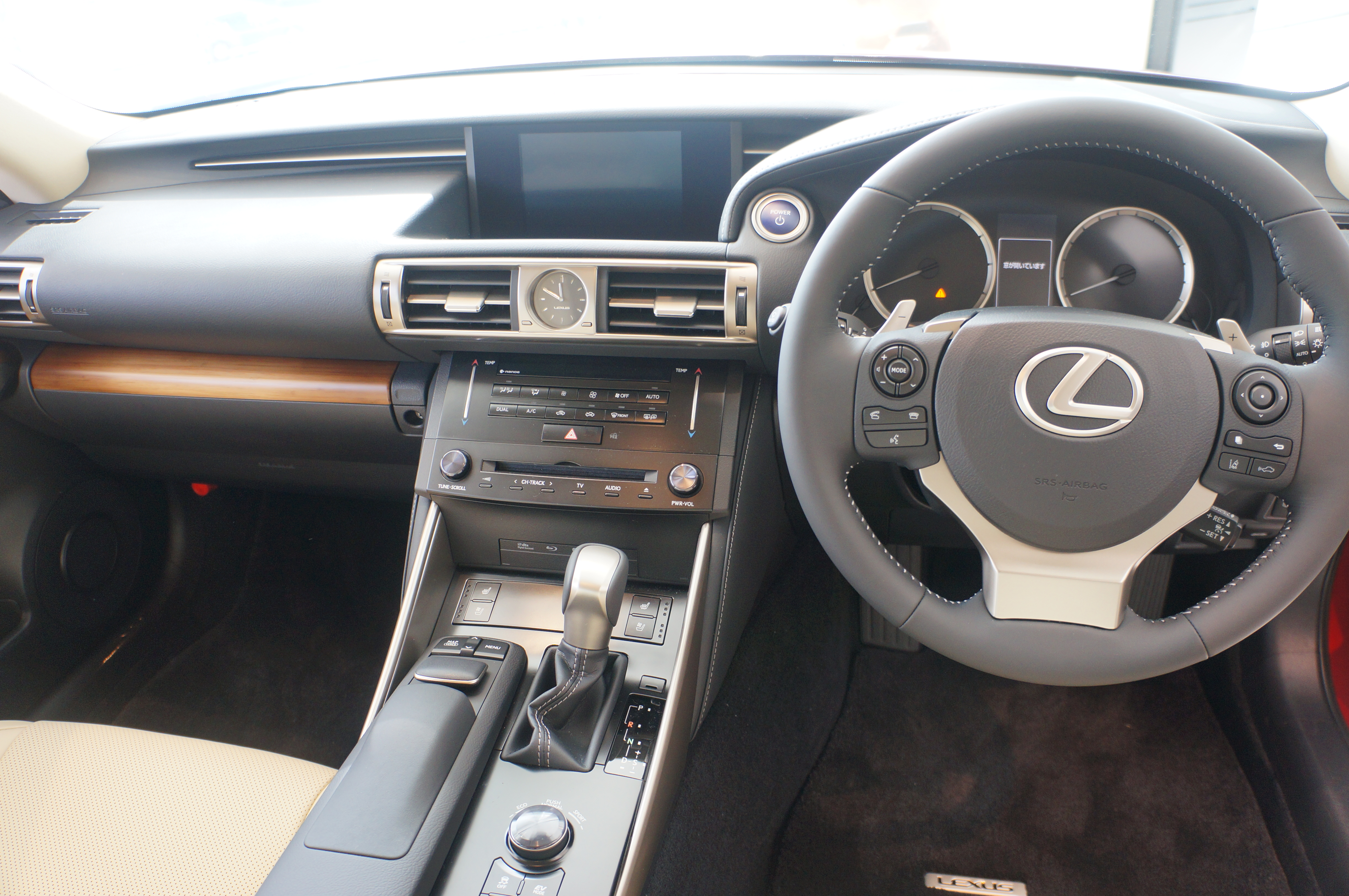 Lexus IS300h 2013 japan intera